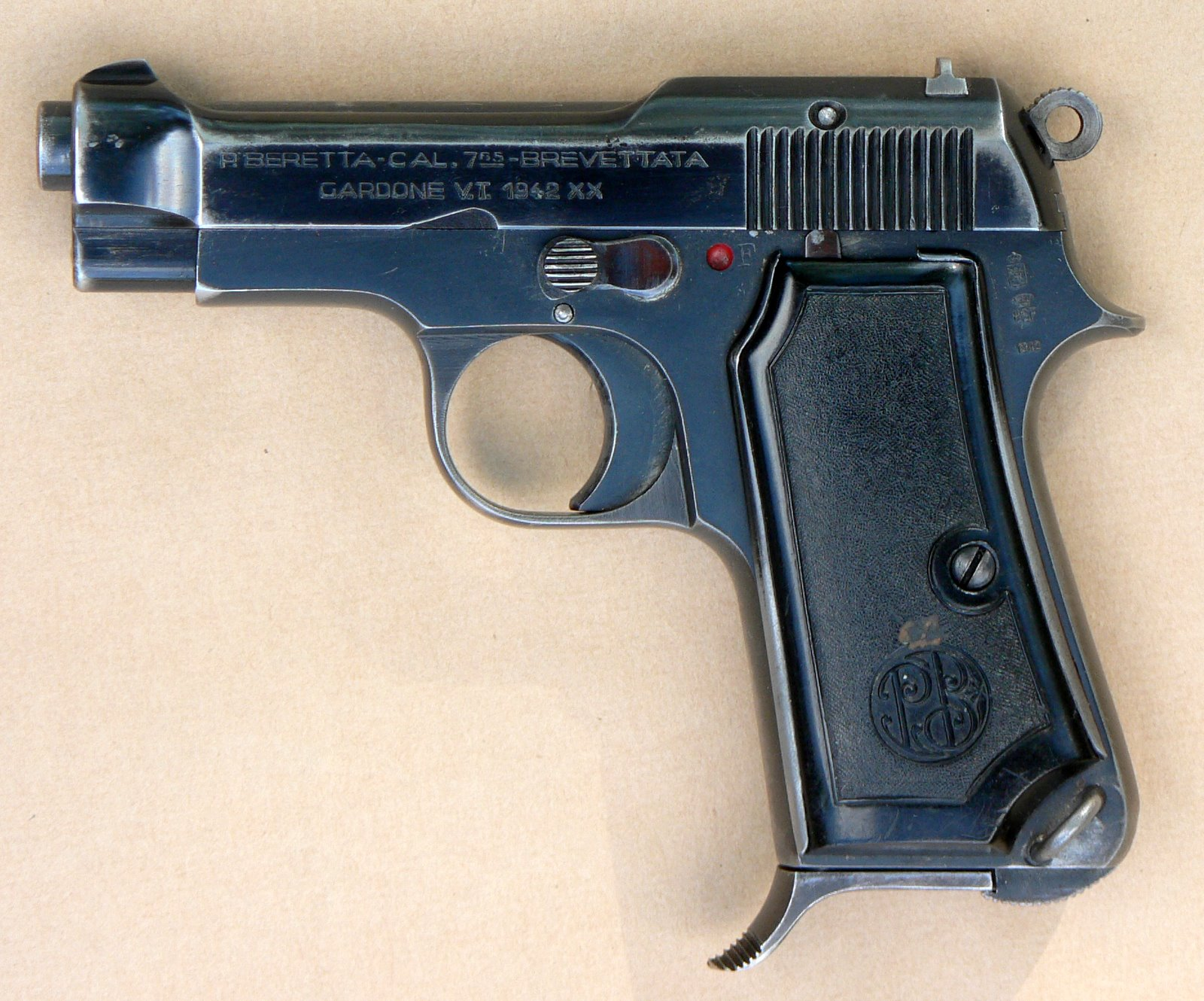 Beretta M1935